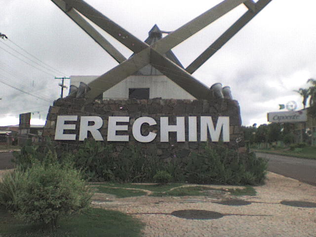 Placa de bem-vindo à Erechim.